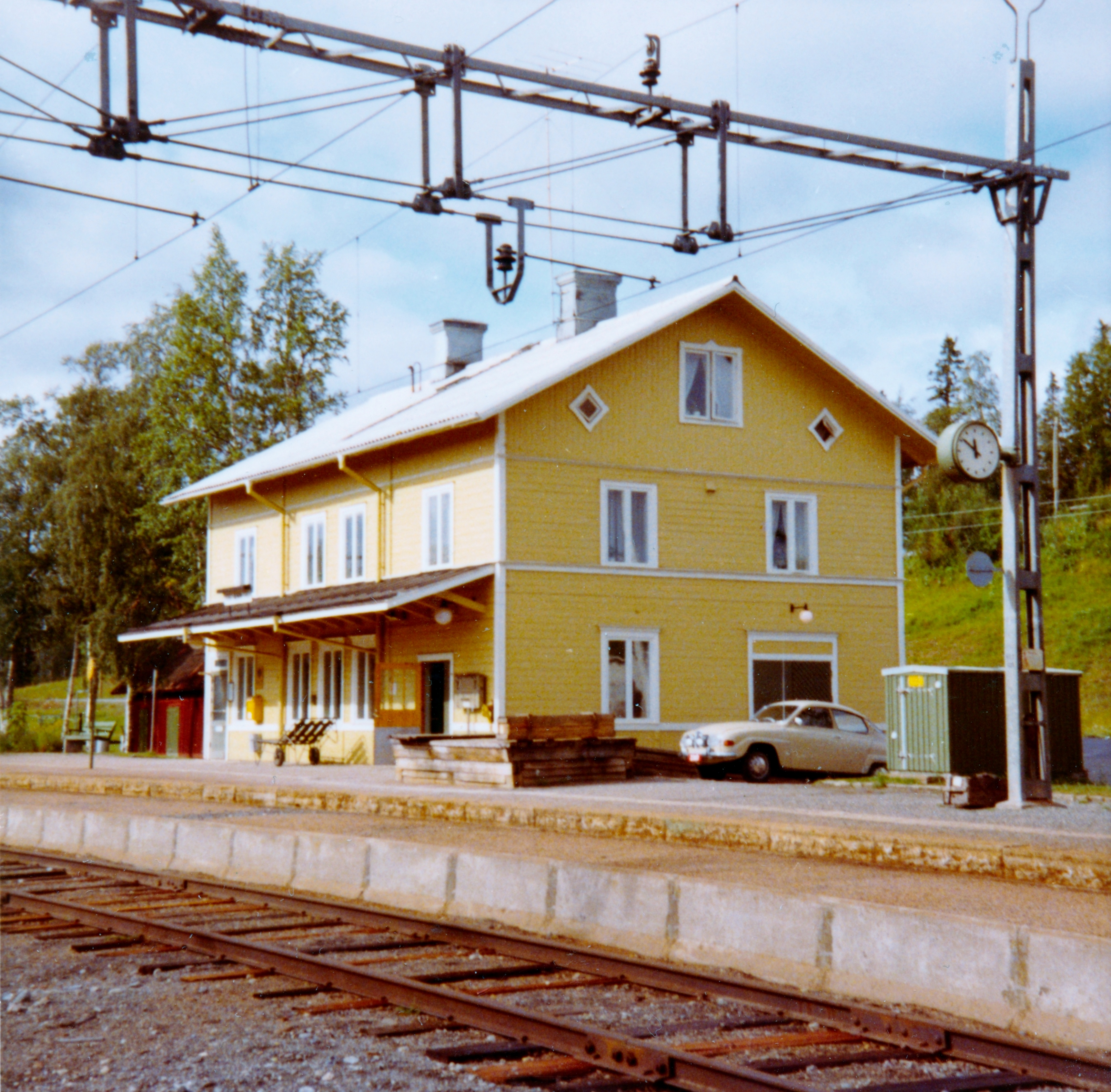 Ånn stationshus